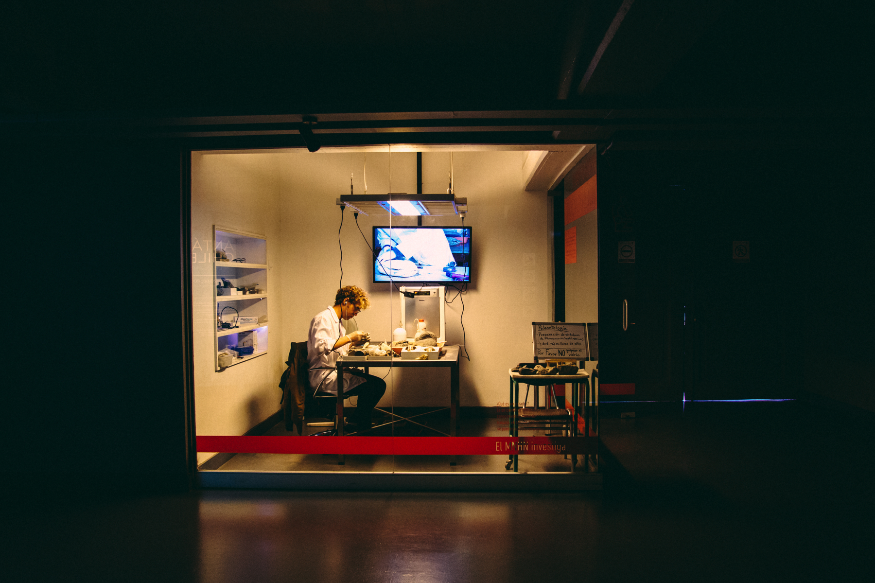 Paleontólogo trabajando en la preparación de vértebras de Plesiosaurio